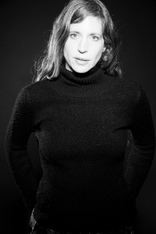 סיגלית תמיר